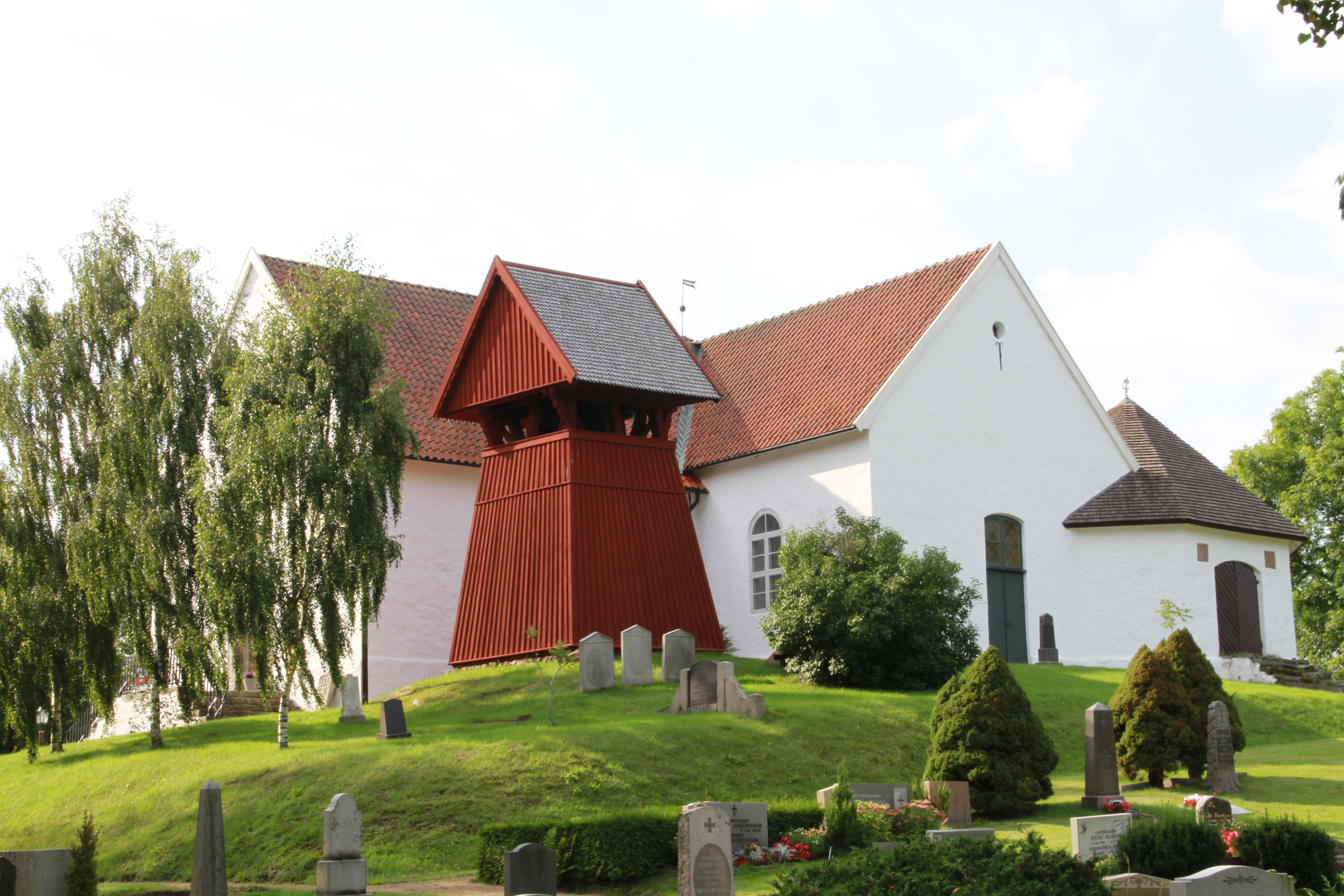 Foto taget från sydost